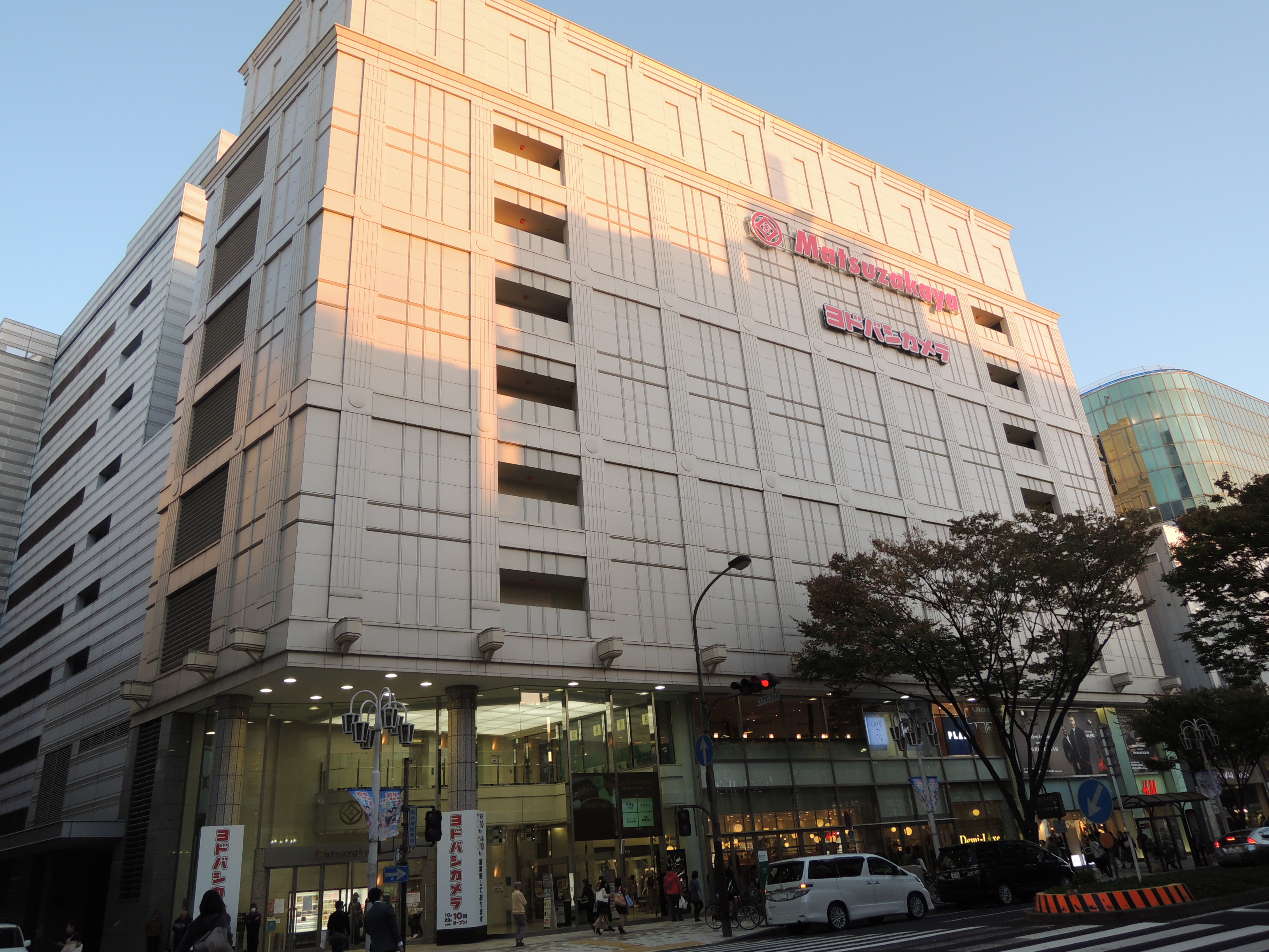 松坂屋 名古屋店 新・南館 ヨドバシカメラのロゴと マルチメディア名古屋松坂屋店のオープン告知あり